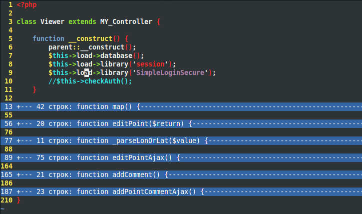 Пример сворачивания (folding) php-кода в Vim, при включённой опции let php_folding = 1